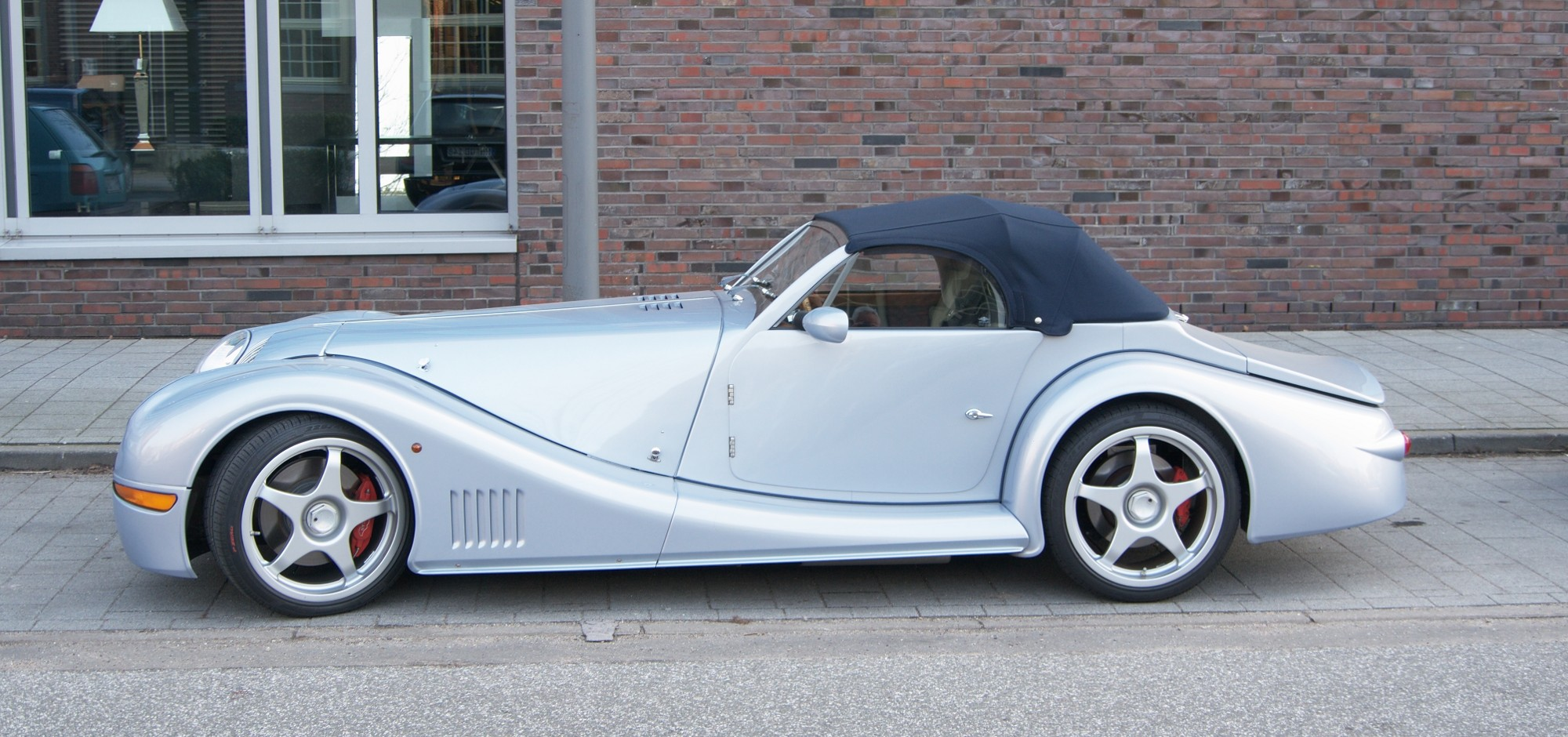 Morgan Aero 8 Seitenansicht